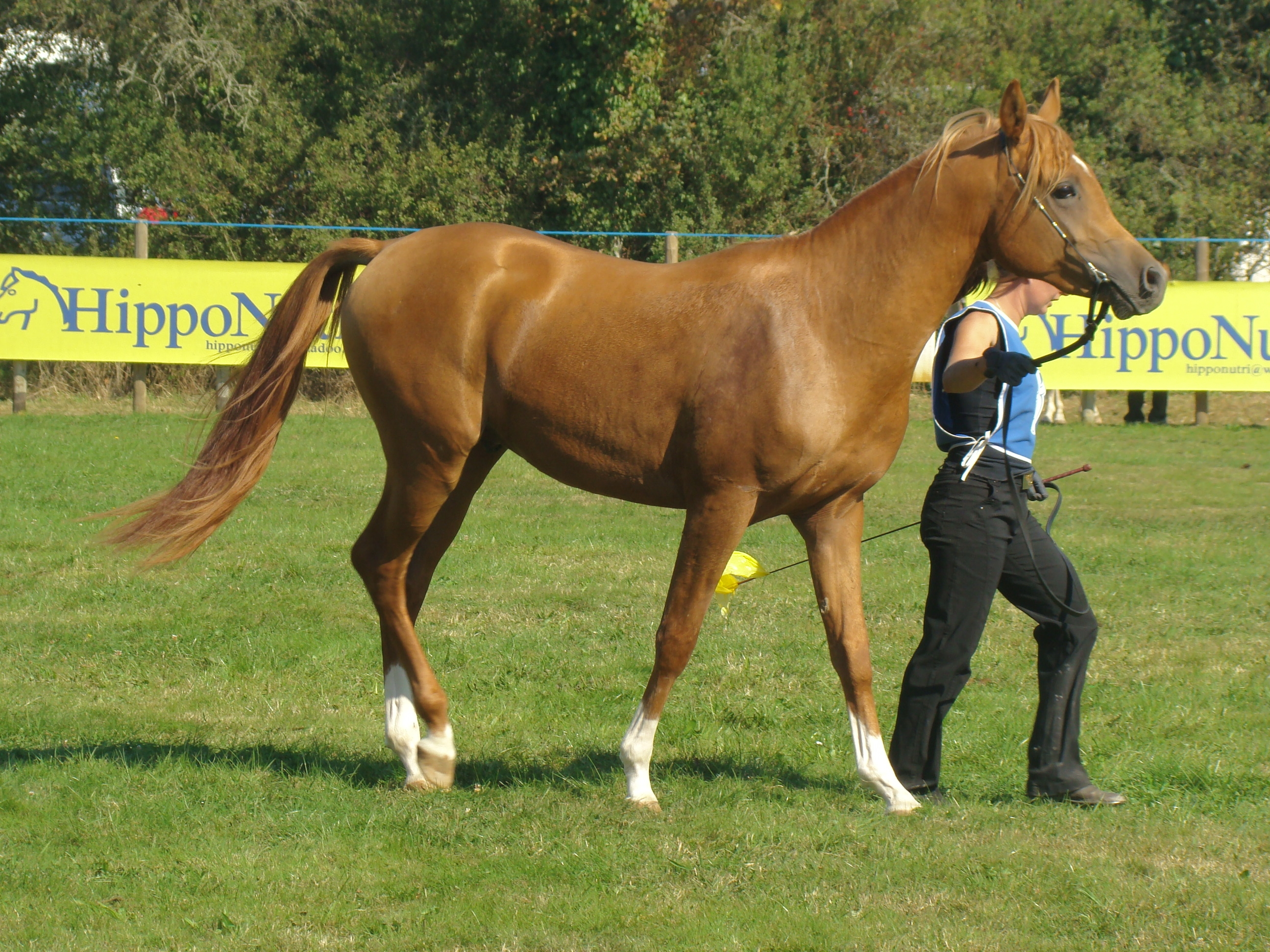 Pur-sang arabe Vice champion de la catégorie 2-3ans à la Fête du Cheval, du poney et de l'Âne à Rennes.